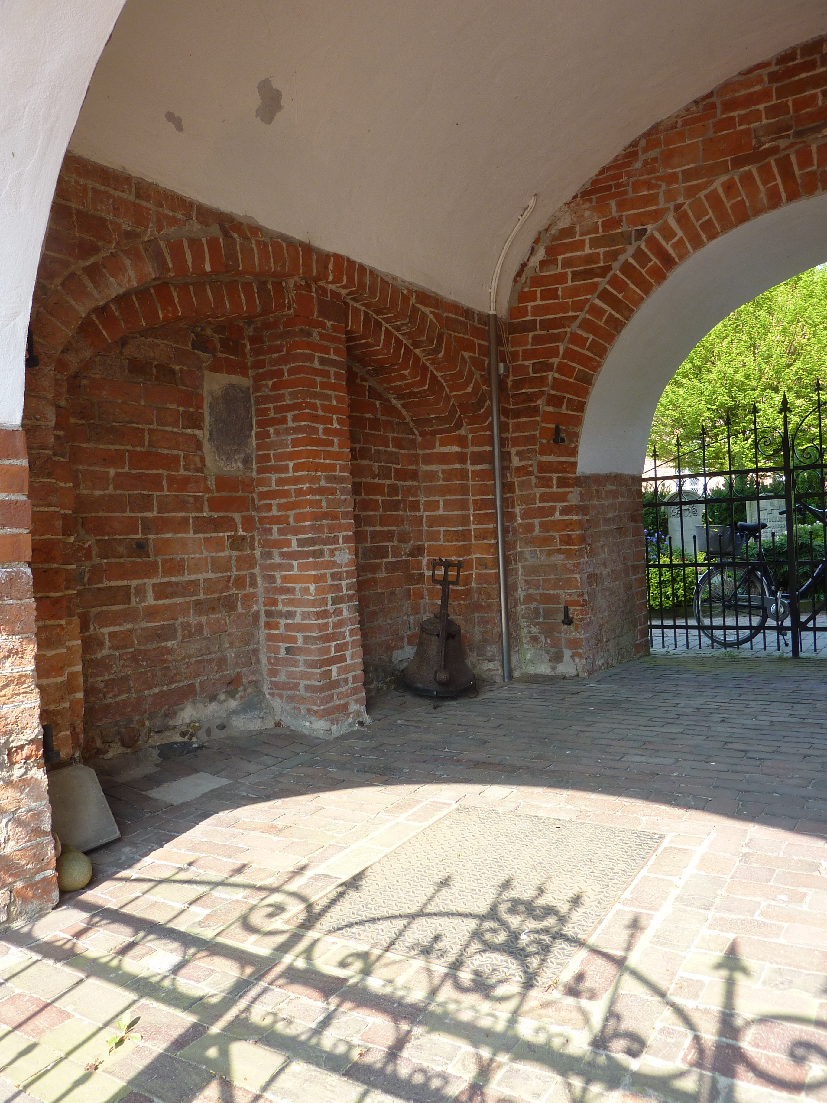 Blick durch den Glockenturm zum Friedhof von Bad Zwischenahn